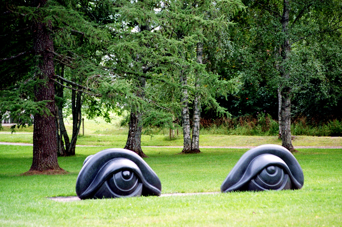 Eye blenches II von Louise Bourgeois, 1996-1997, Schwarzer Zimbabwe Granit - Standort: Skulpturengarten Umea